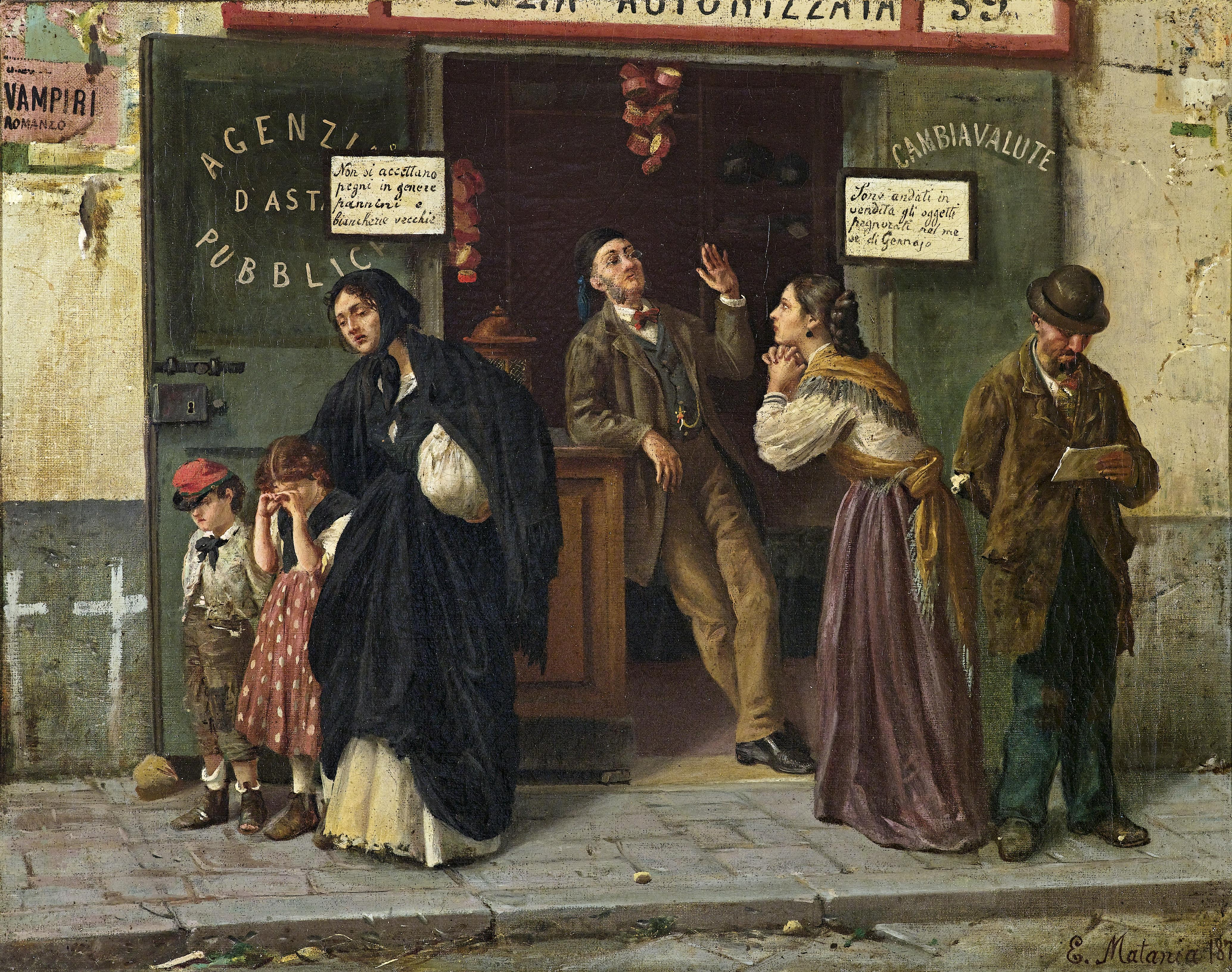 Beim Pfandleiher, signiert und datiert E. Matania 187. (?), Öl auf Leinwand, 38 x 48 cm